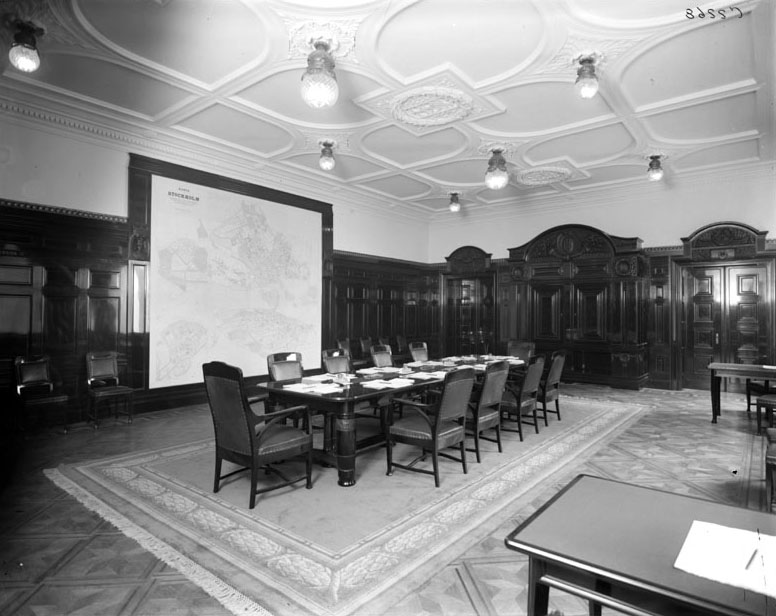 Interiör från direktionsrummet på Stockholms intecknings-garanti-aktiebolag på Fredsgatan Tid: 1903 - 1910. Sedan 1982 är det Medelhavsmuseet och restauratören som använder lokalen.